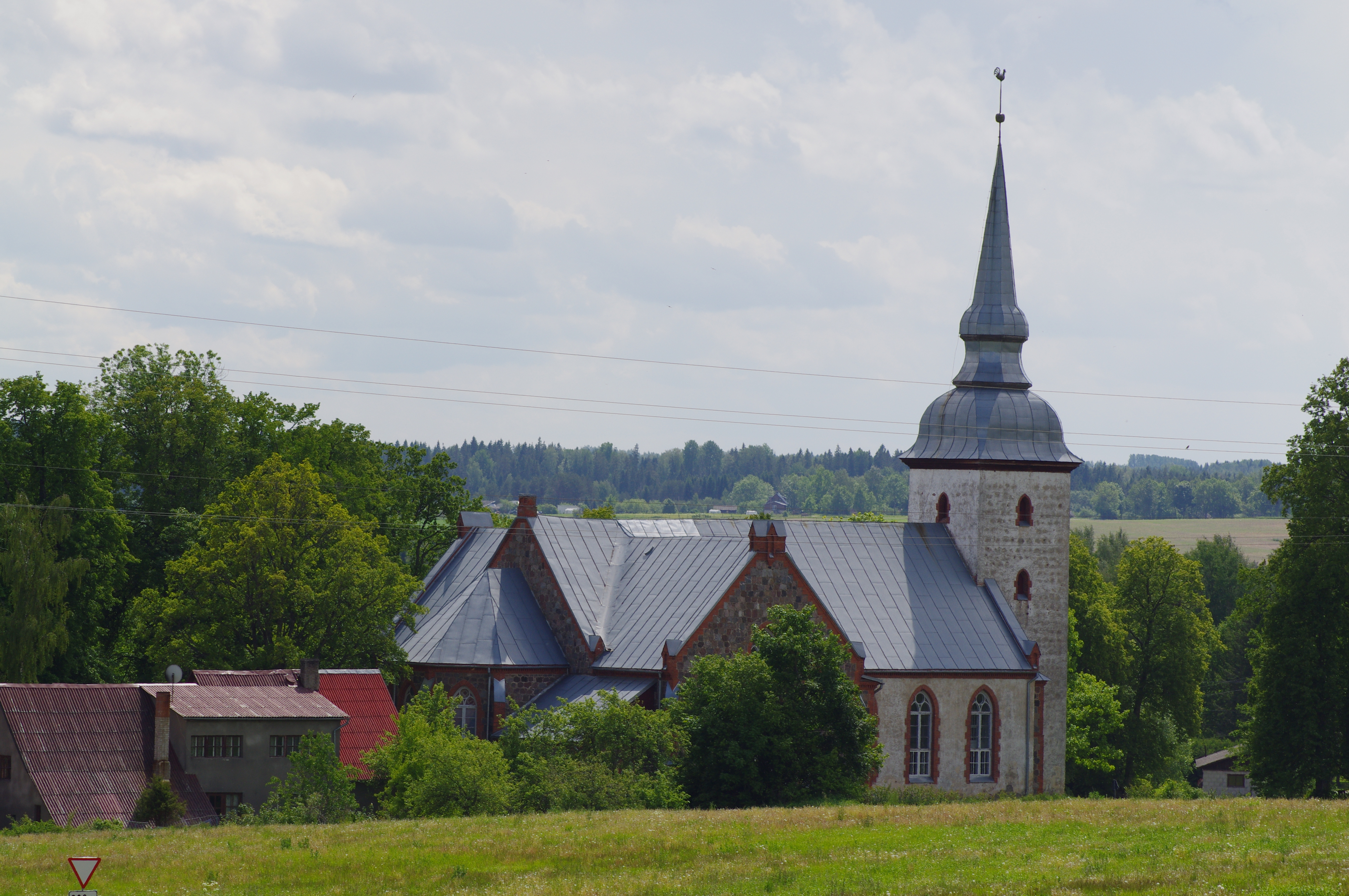 Vastseliina kirik, 18.–20. saj.